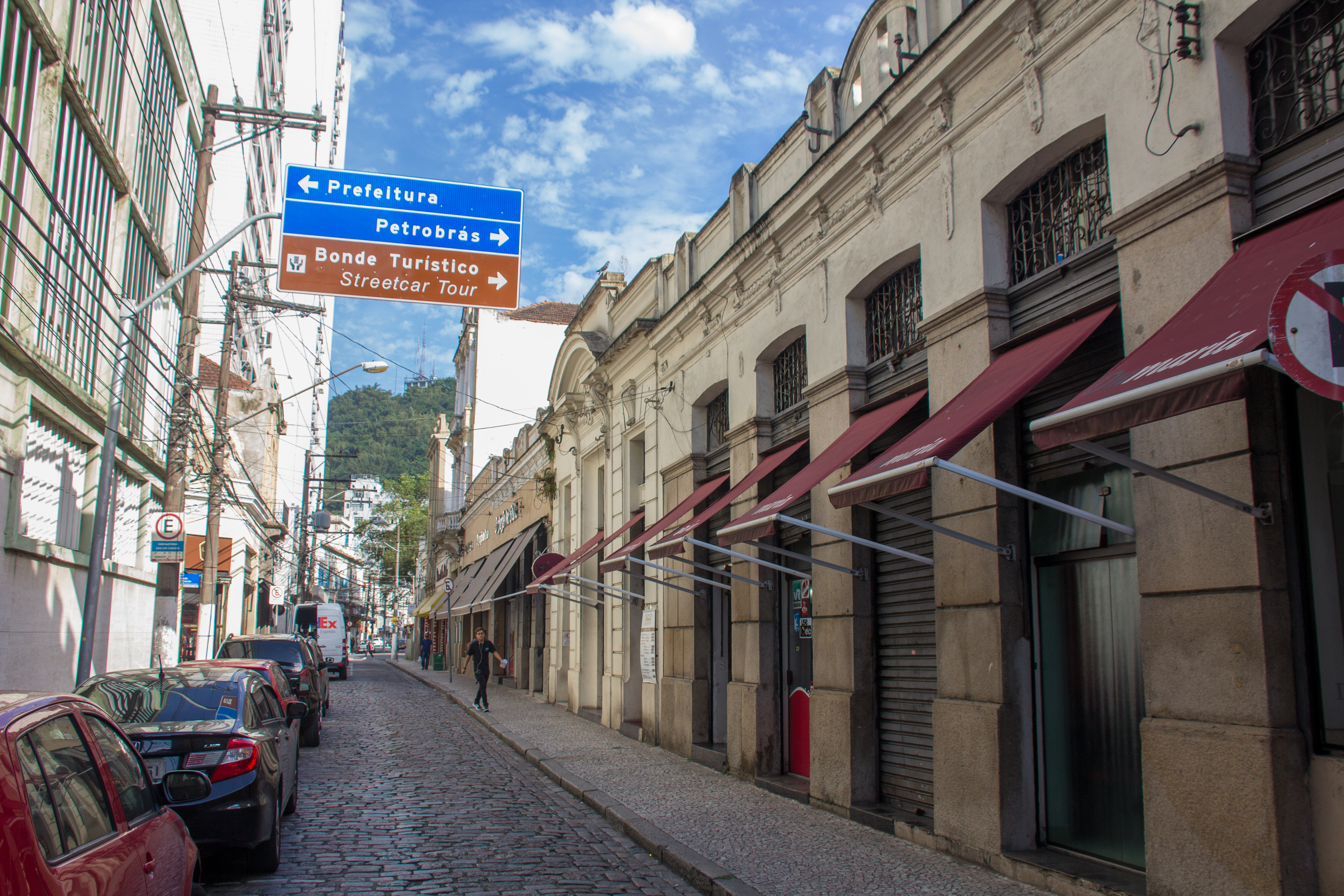 Santos, Brazil